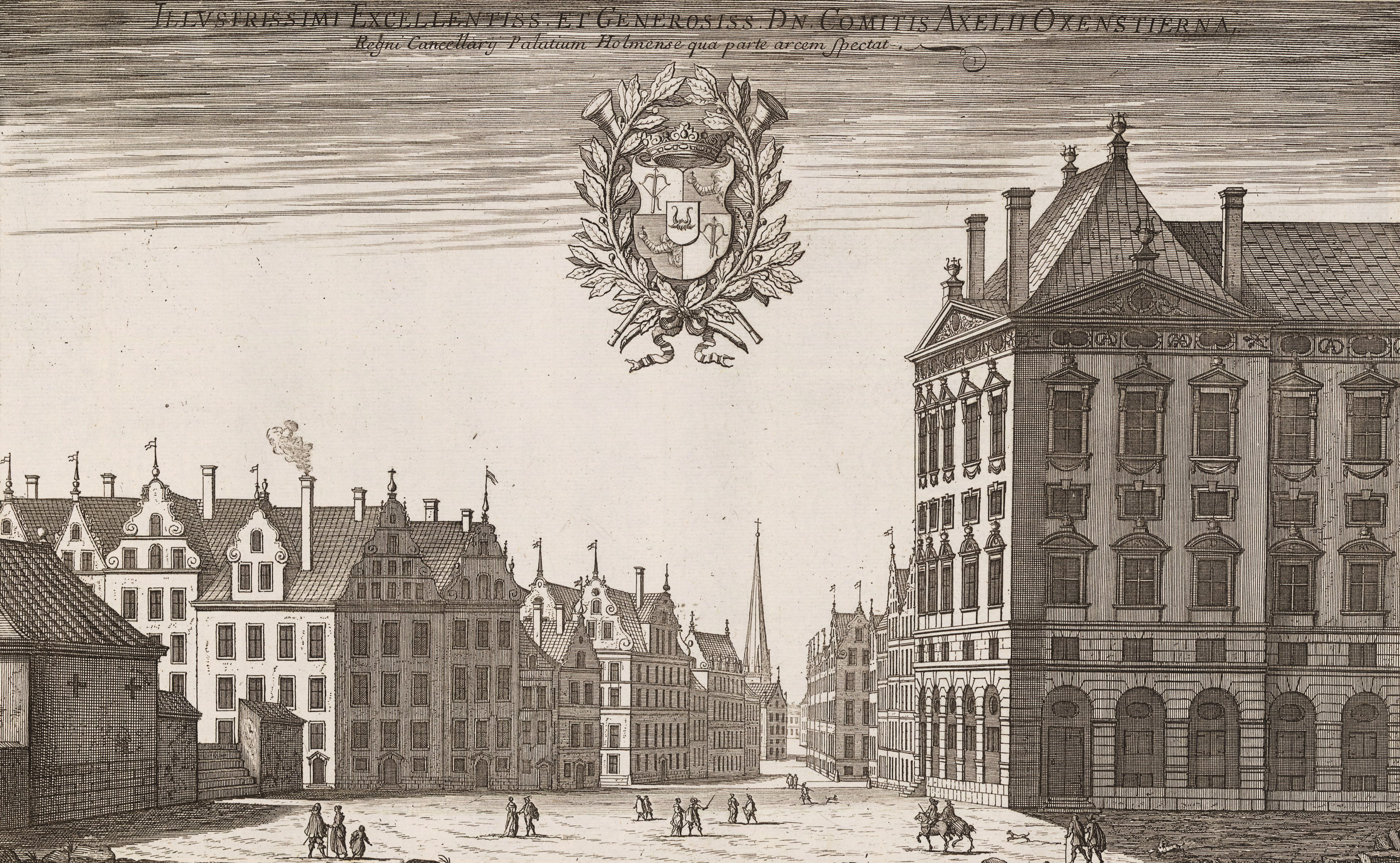 Titel Illustrissimi Excellentiss. et Generosiss Dn. Axelii Oxenstierna Regni Cancellarij Palatium Holmense qua parte arcem spectat Titel i översättning Den vittberömde, utmärkte och högvälborne herr greven och rikskanslern Axel Oxenstiernas palats i Stockholm sett från slottet